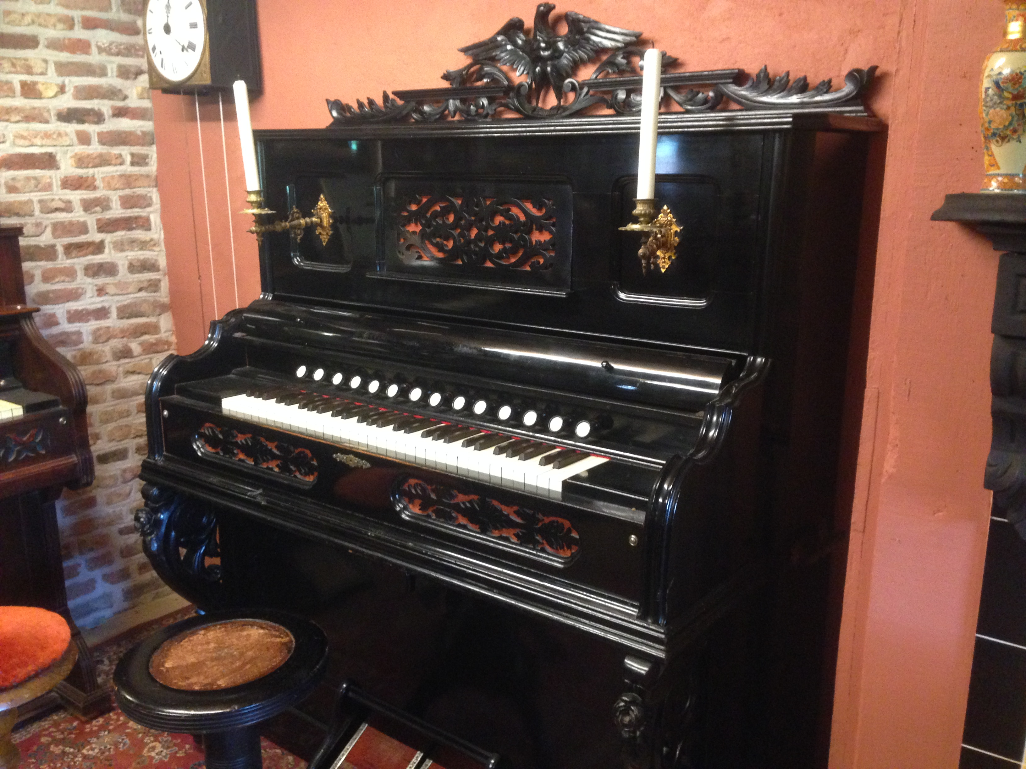 Harmonium Museum in Paasloo, Overijssel, Netherlands